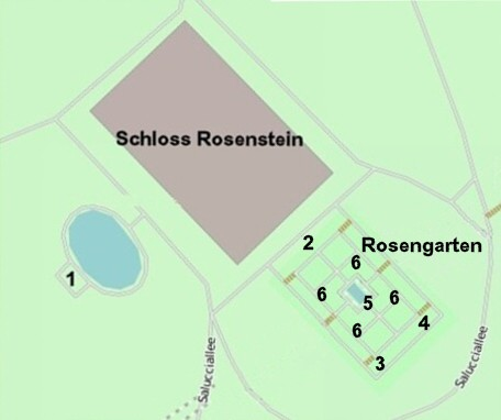 Lageplan der Gartenplastik bei Schloss Rosenstein in Stuttgart. Legende Musen 1 Wasser- und Wiesennymphe 2 Kapitolinische Venus 3 Venus von Arles 4 Venus von Milo 5 Orientalische Sklavin 6 Vier Betongussvasen